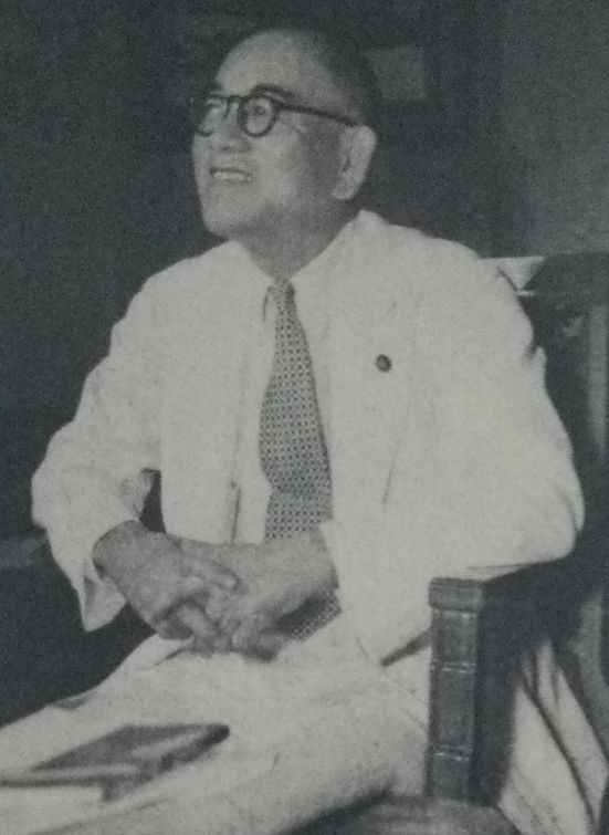 岡崎勝男